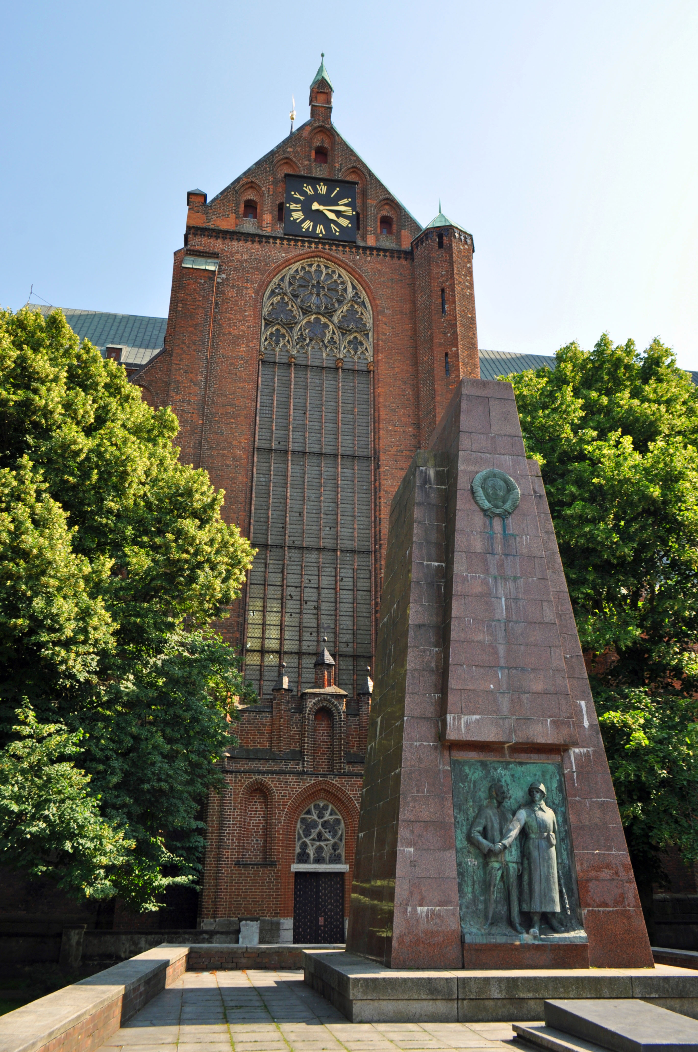 Foto aufgenommen in der Marienkirche in Stralsund am 7.7.2013.